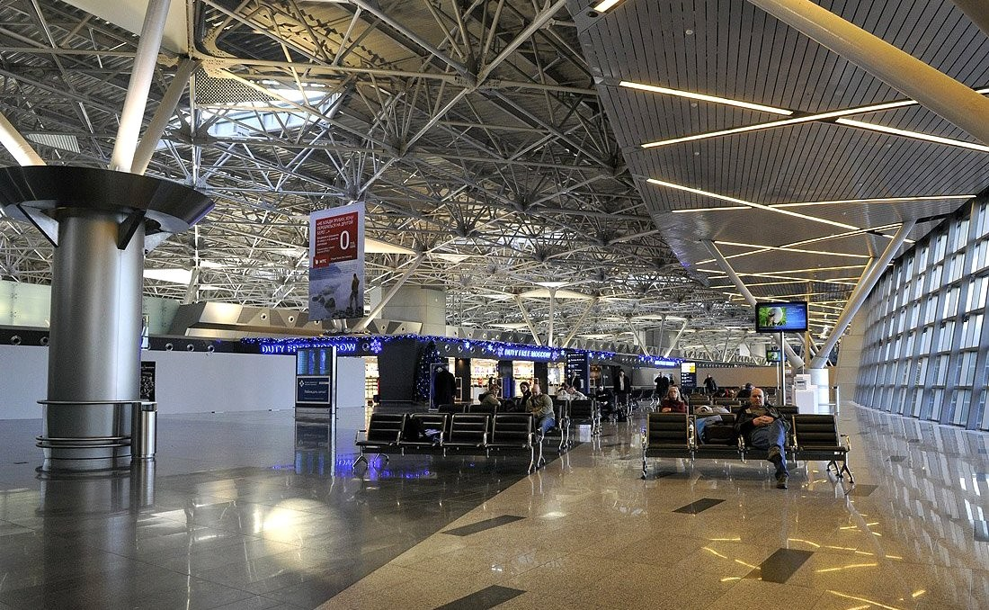 Терминал А аэропорта Внуково